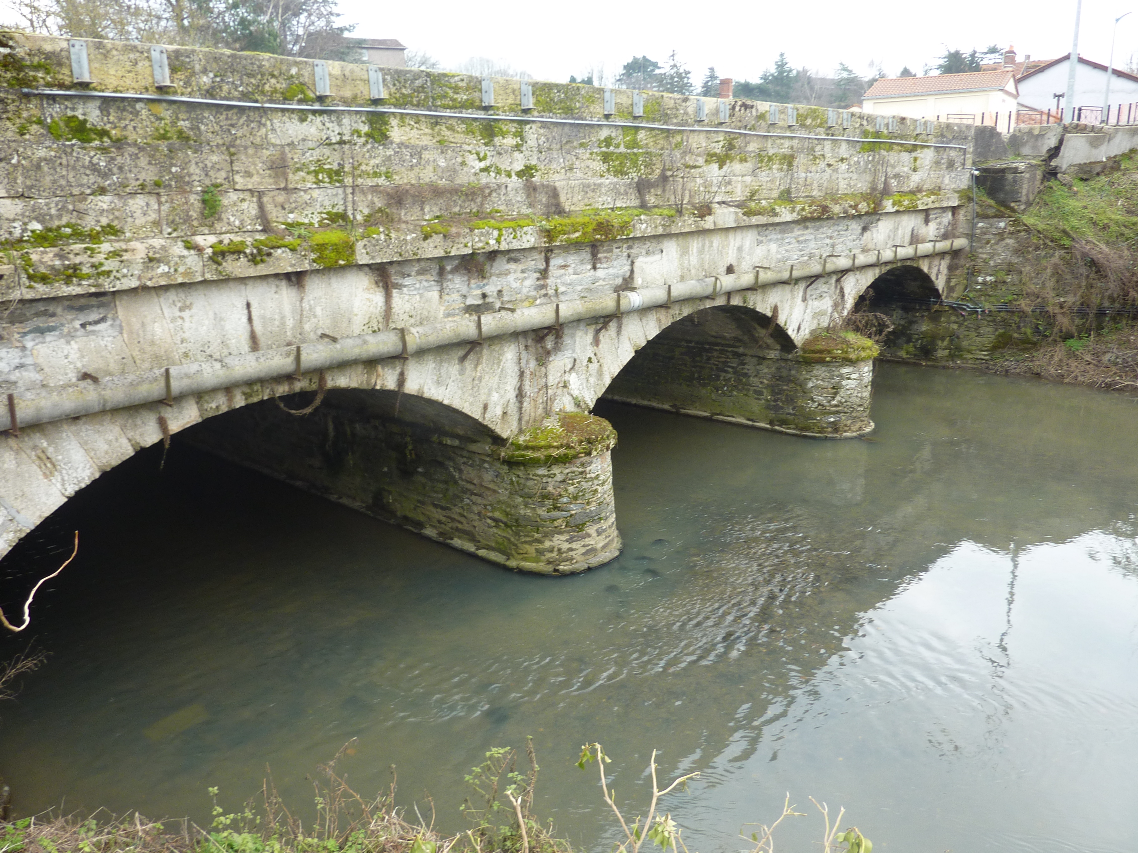 Vue d'ensemble